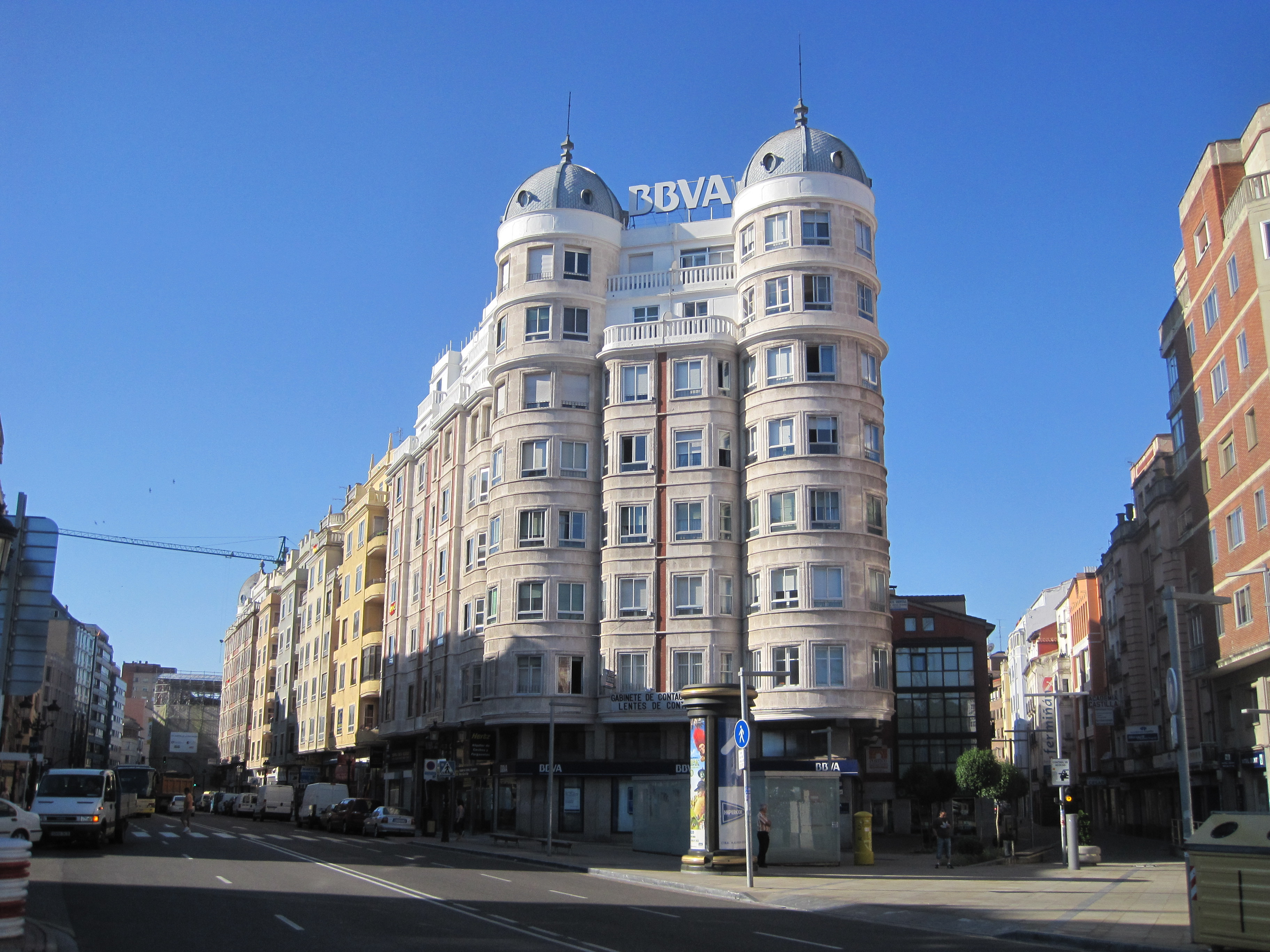 Edificio BBVA, situado en Plaza Vega, Burgos.